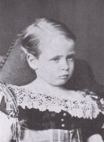 Príncipe Frederico de Hesse